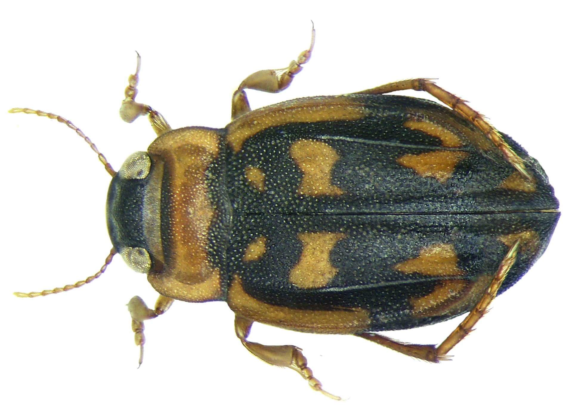 Peschetius carinipennis (Régimbart, 1895) Familie: Dytiscidae Grösse: 3,8 mm Fundort: Zimbabwe, Kotwa leg. Lillig, 1986; det. A.Skale Foto: U.Schmidt, 2007